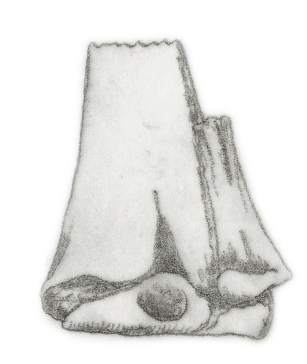 Illustration of a fossil of Ornithotarsus